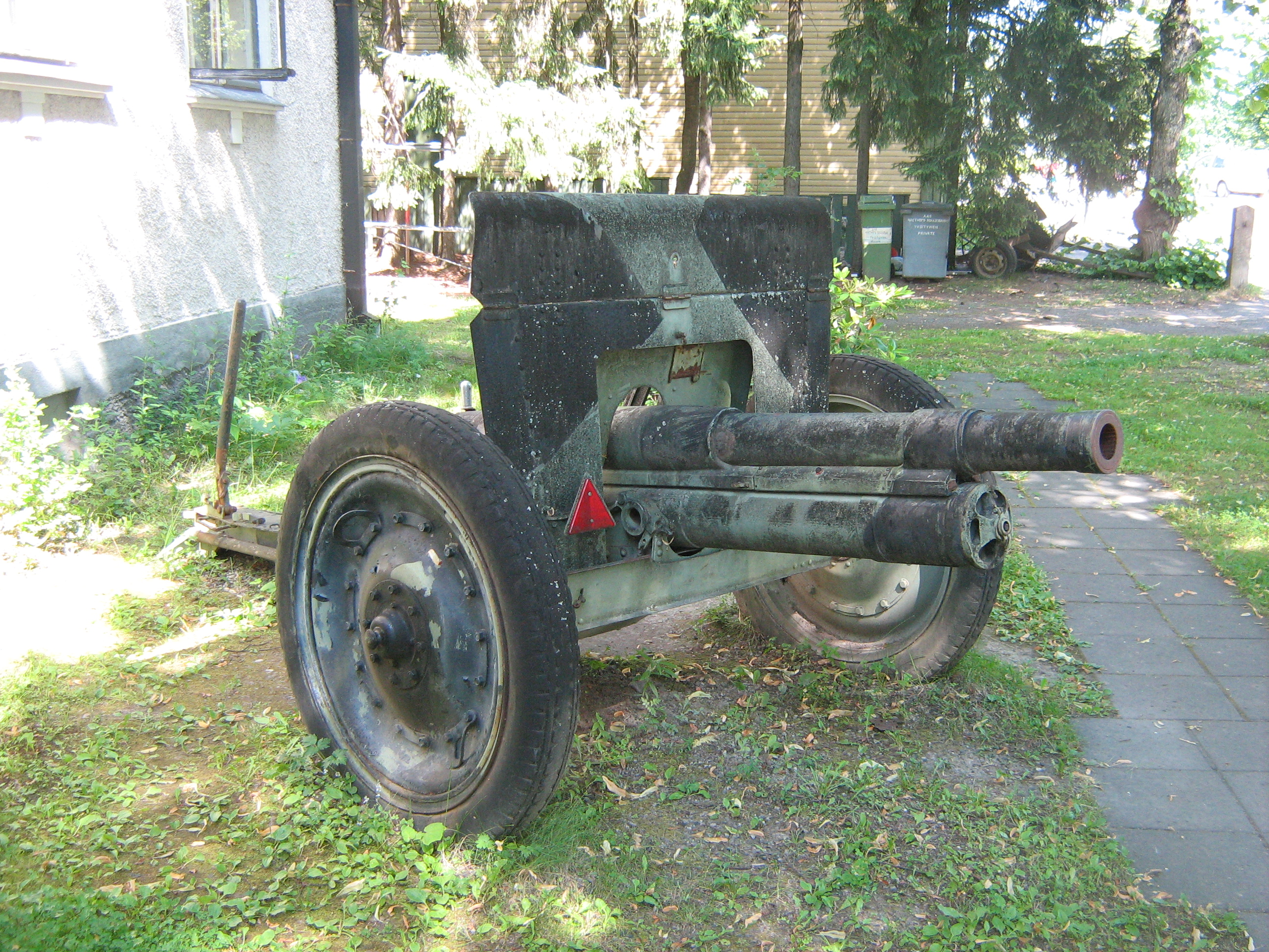 Imatran Veteraani ja Lottamuseo